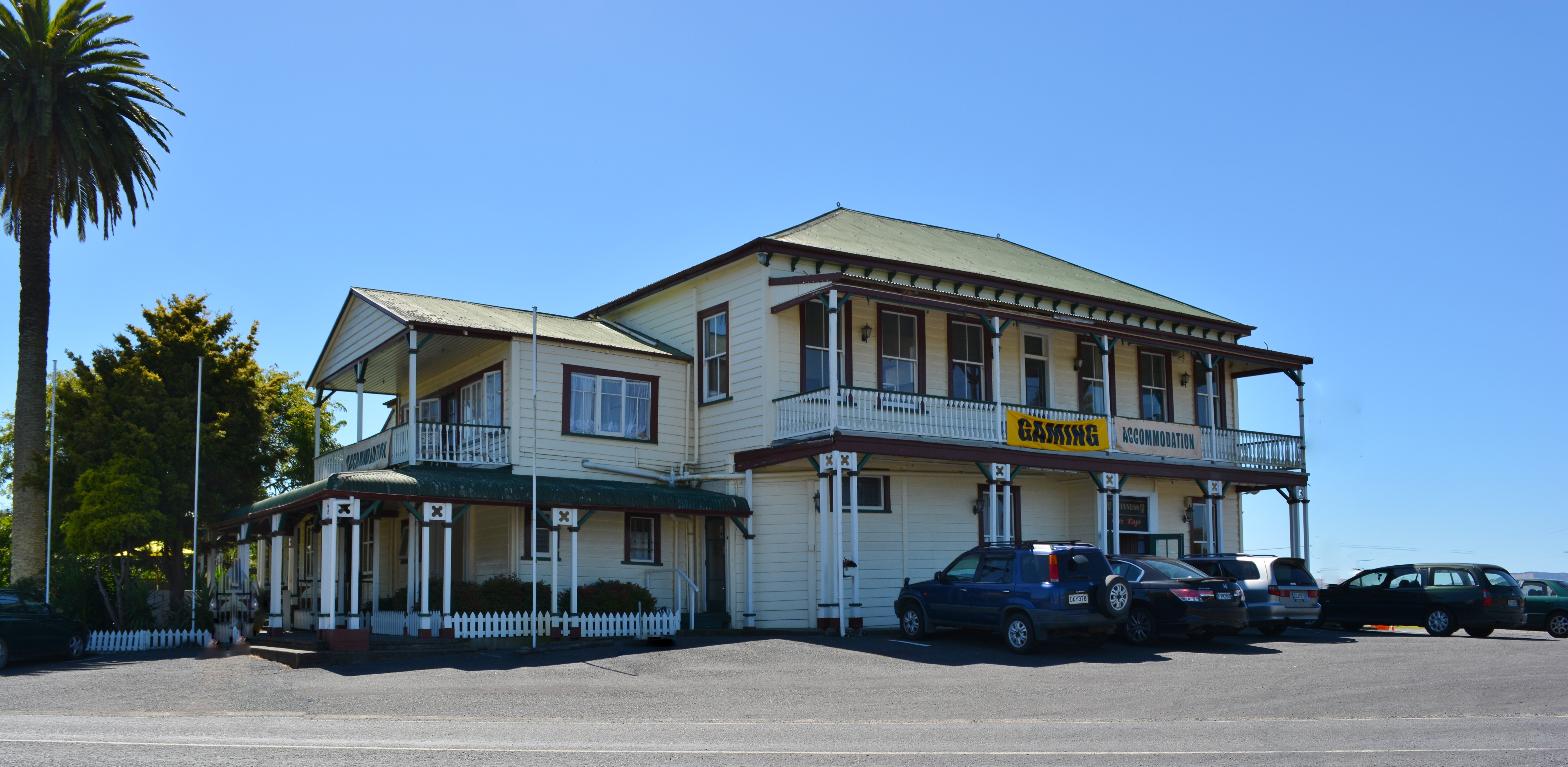 Rangiriri Pub